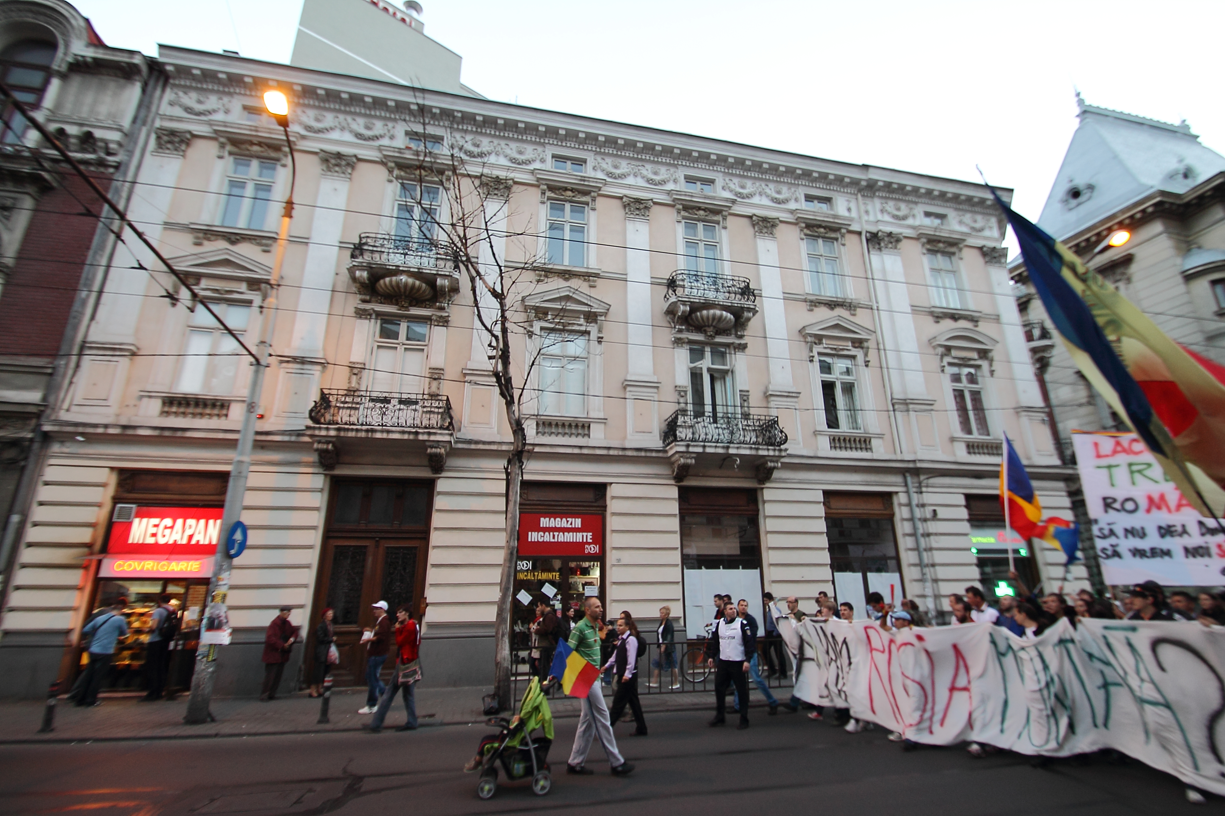 Clădire monument istoric, Bd. Carol, nr. 6 sector 3